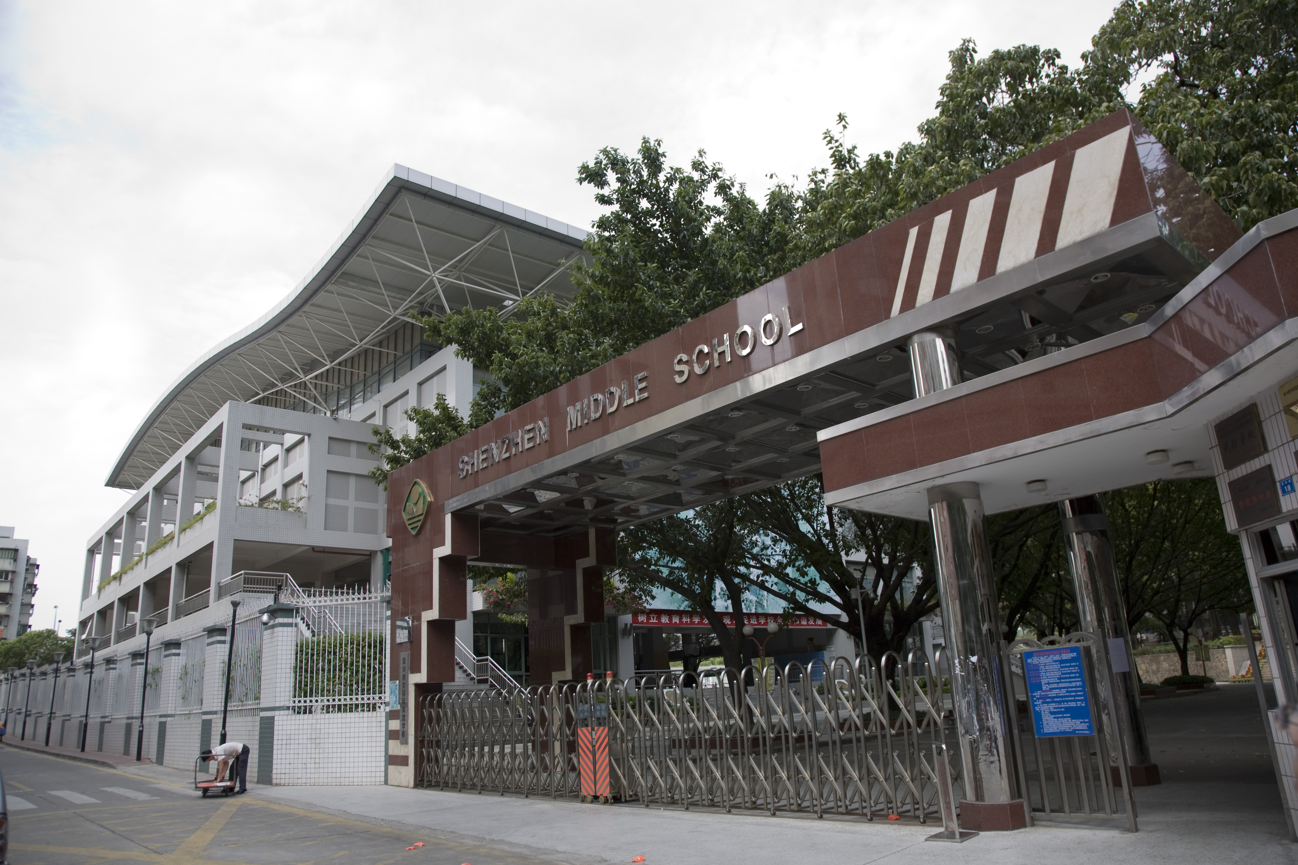 深圳中学本部正门，位于深中街。